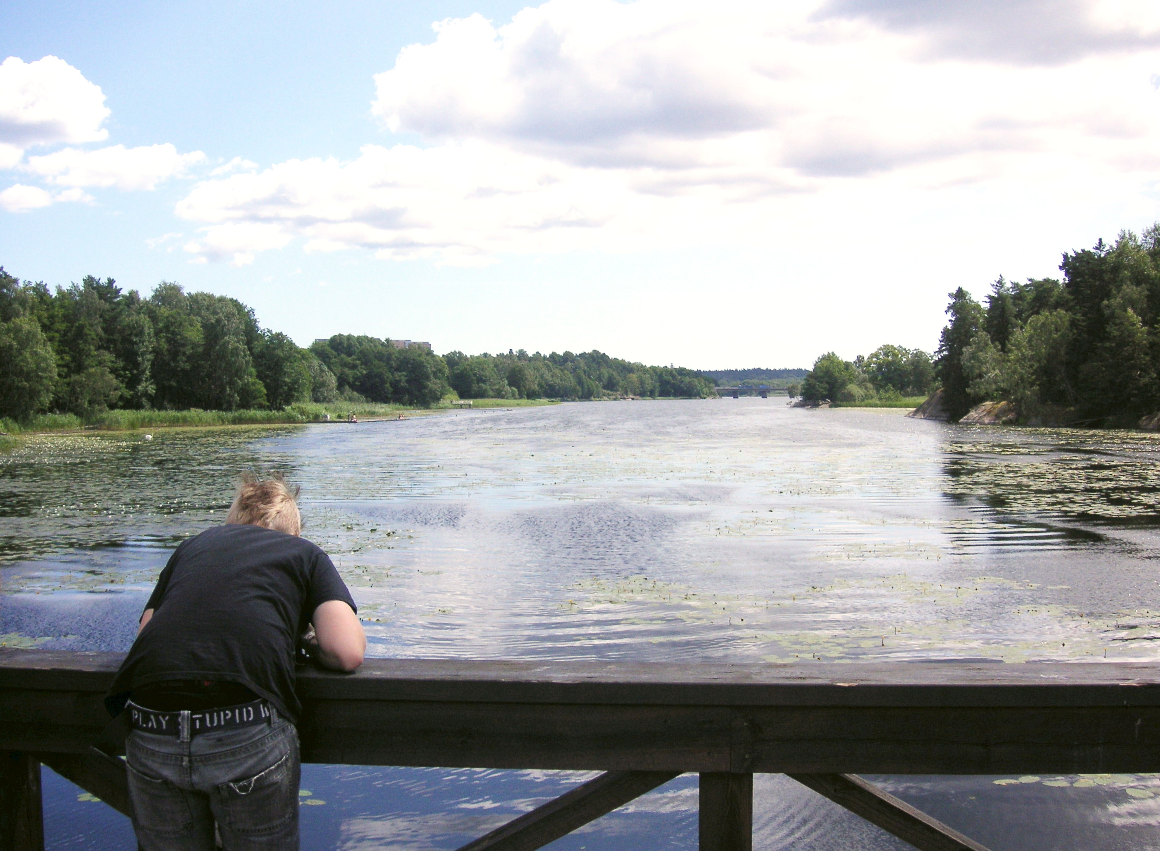 Sjön Magelungen från Militärbron